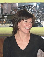 Coca Guazzini en el lanzamiento de Normal con alas.